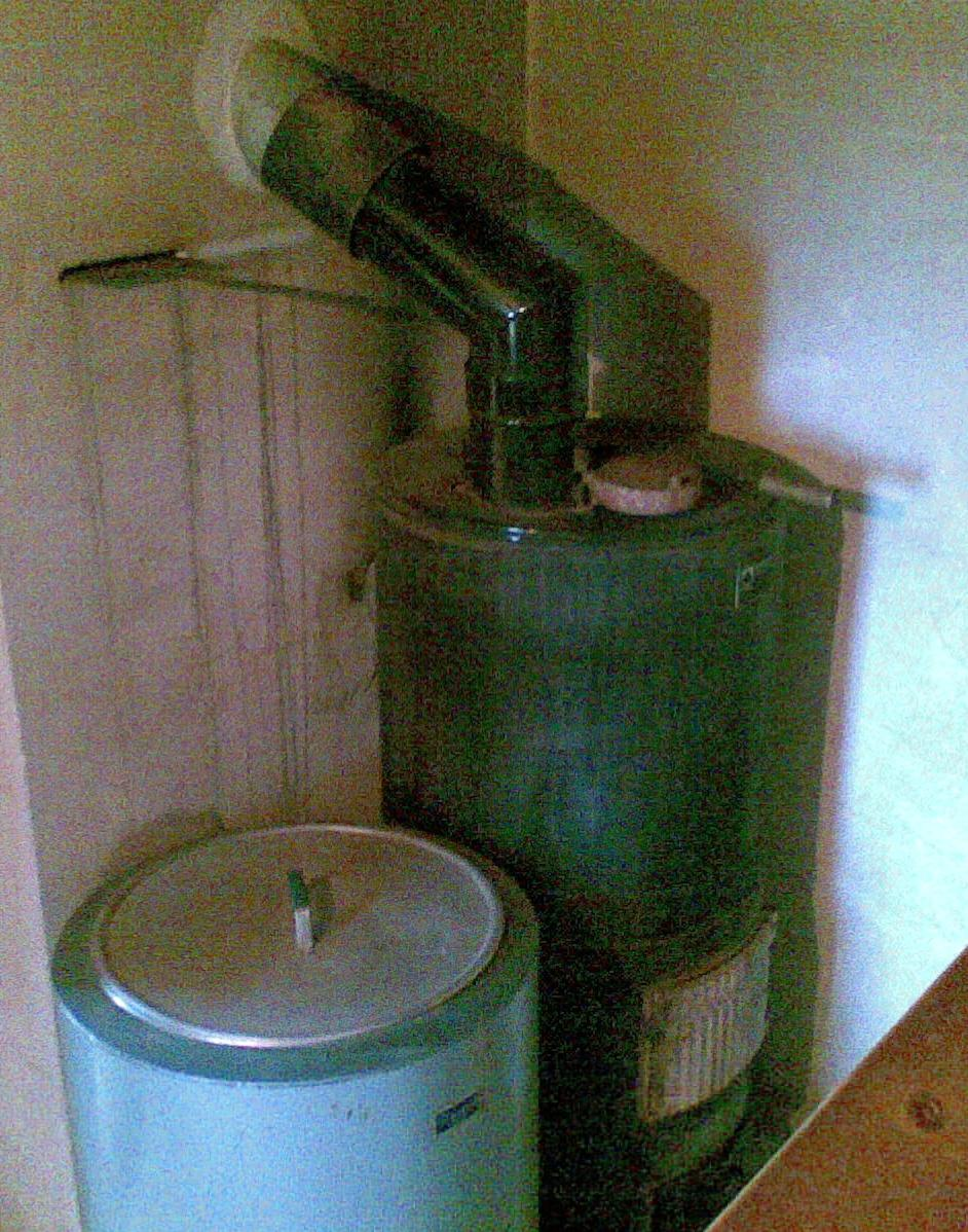 Suomalainen aitokiuas ja veden lämmityspata